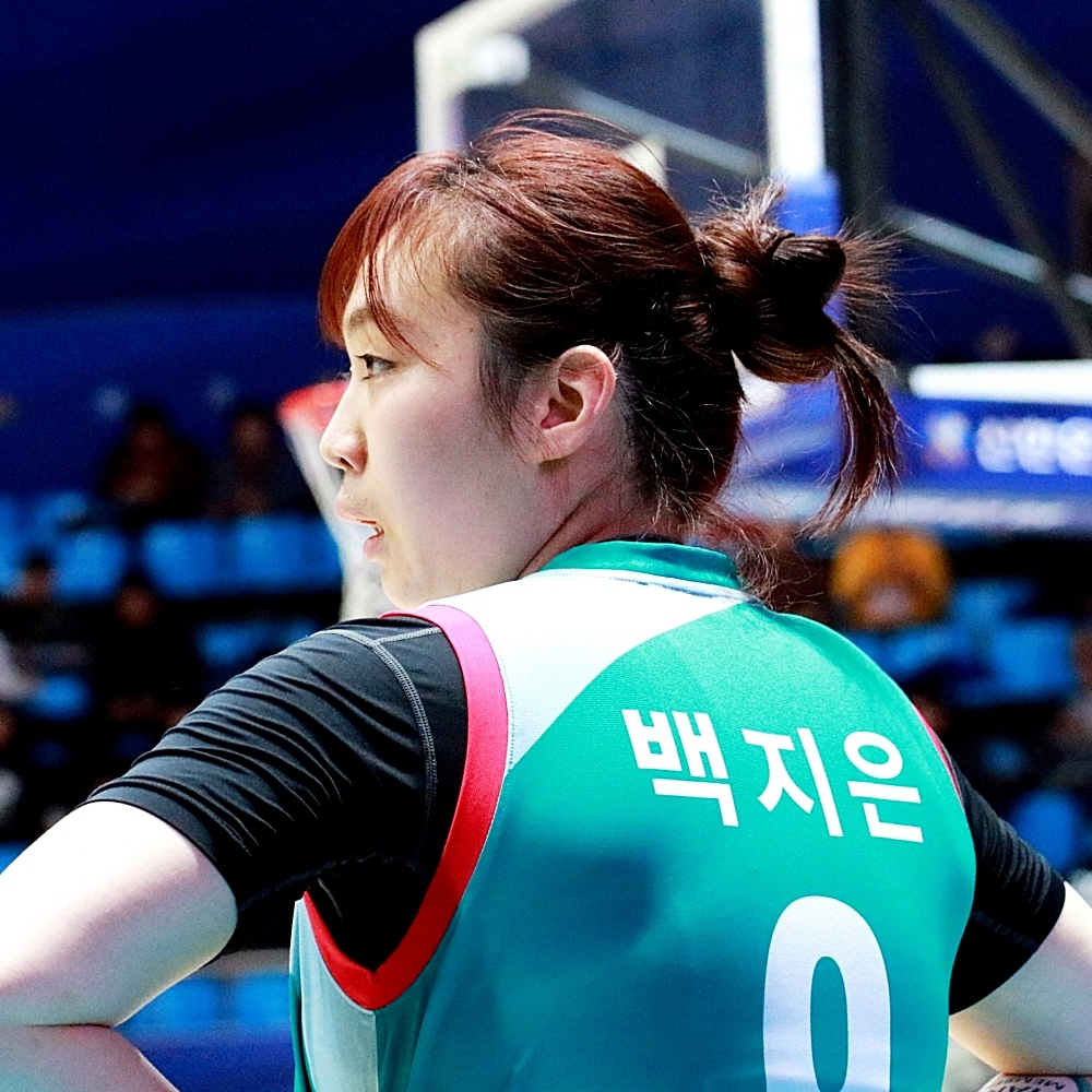 160210 여자농구 신한은행 vs 하나외환 직찍 1